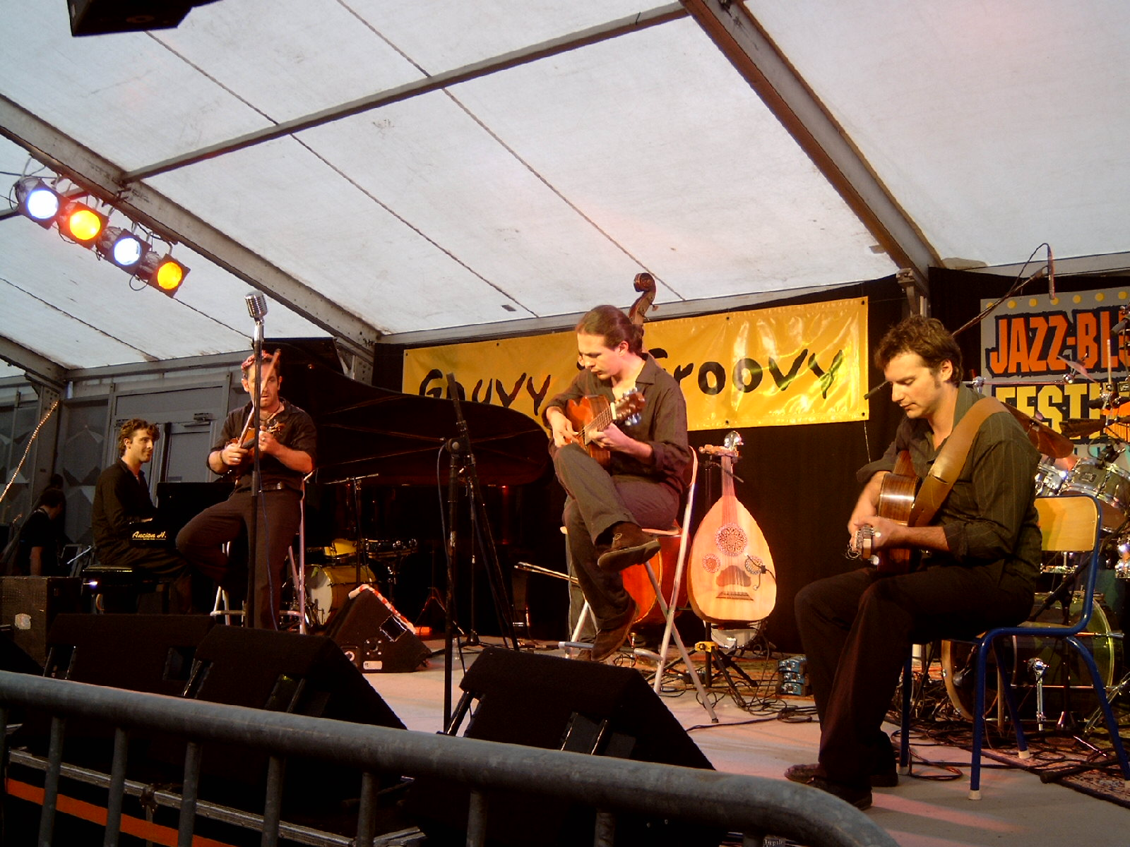 La formation marseillaise Poum Tchack au Jazz & Blues Festival de Gouvy en août 2005